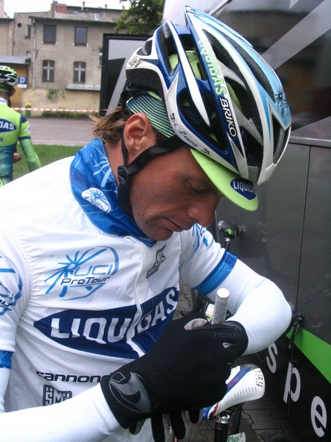 Czwarty etap 64. Tour de Pologne: Chojnice - Poznań